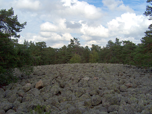 Pirunpelto Turun Nunnavuorella.